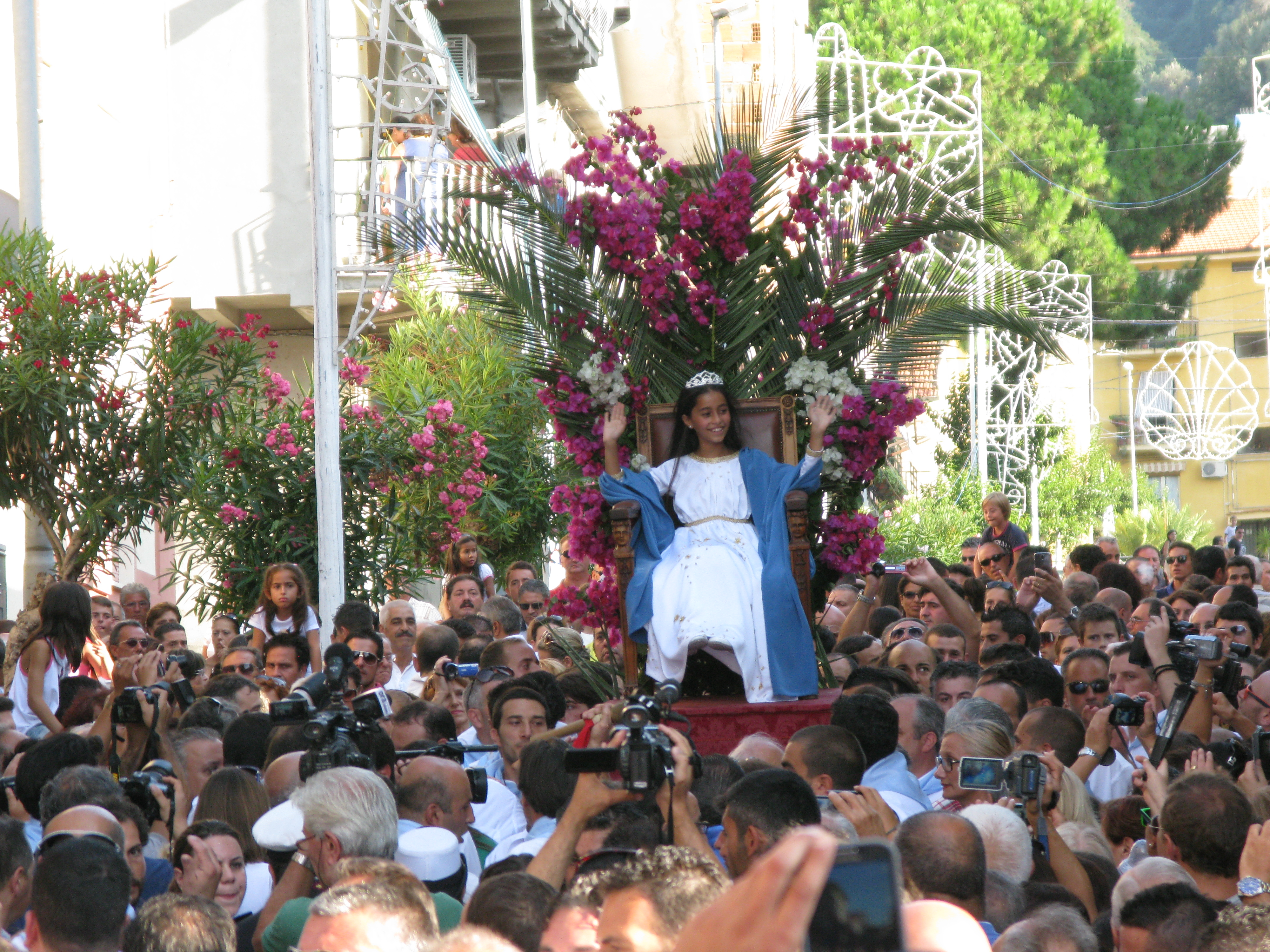 L'Animella, appena uscita da casa Tigano, viene fatta sedere sulla Portantina e trasportata a spalla. La portantina è composta da una poltrona rossa adornata alle sue spalle da foglie di palma disposte in modo semicircolare e bouganville.